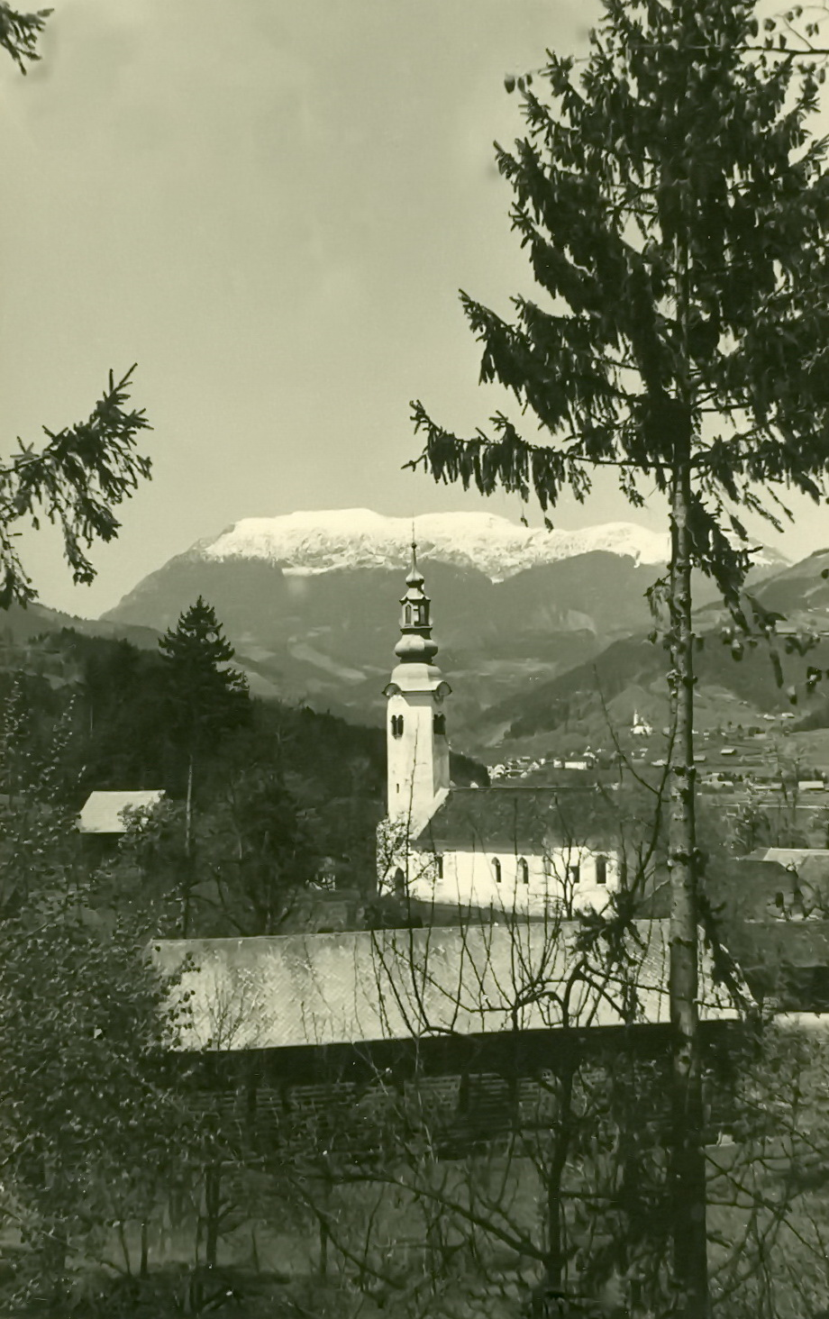 Radmirje Štajerska 1938. godine